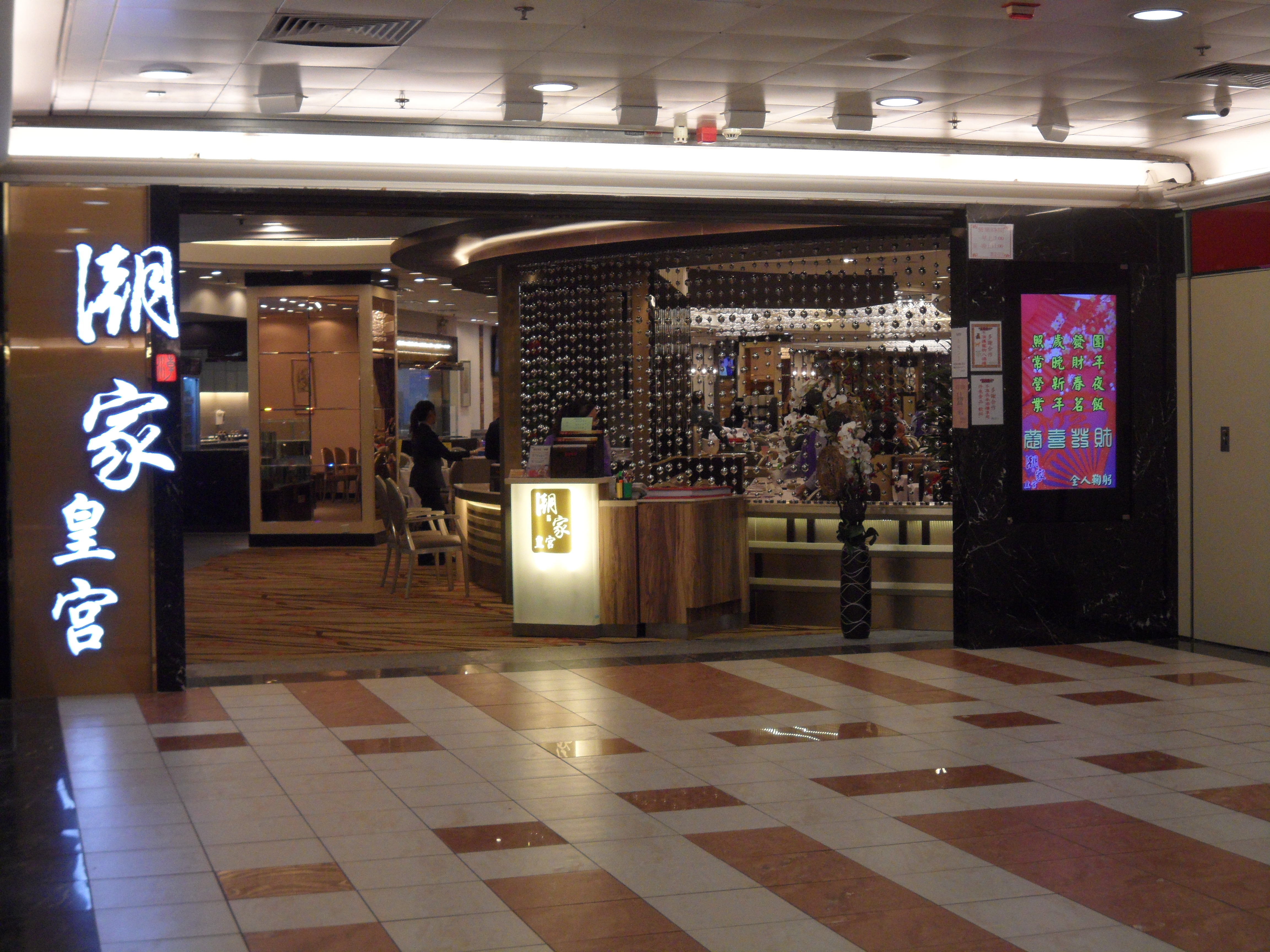 彩明商場 潮家皇宮酒樓